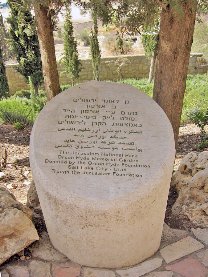 Orson Hyde memorial park in Jerusalem Israel